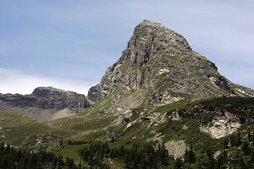 Piz de Mucia bei San Bernardino